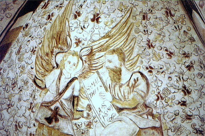 Broager Kirke.